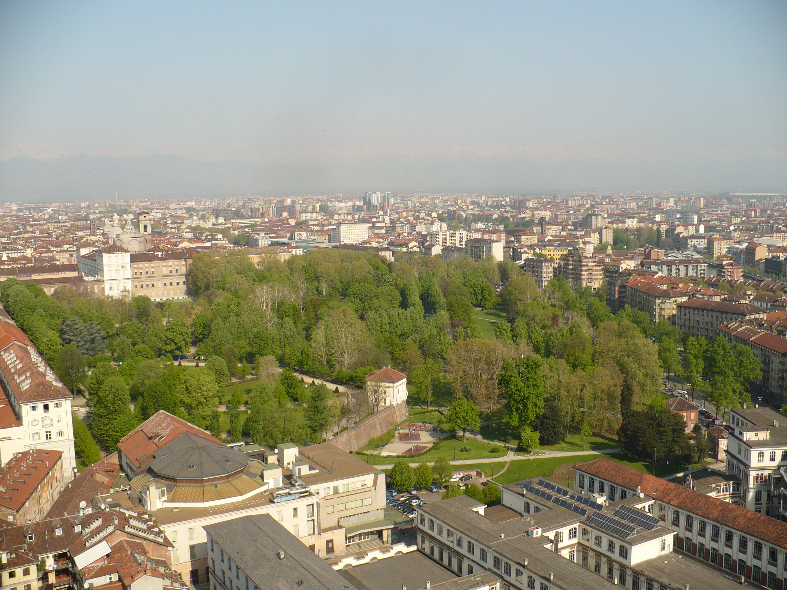 Giardini Reali visti dalla Mole Antonelliana - Torino - Italia